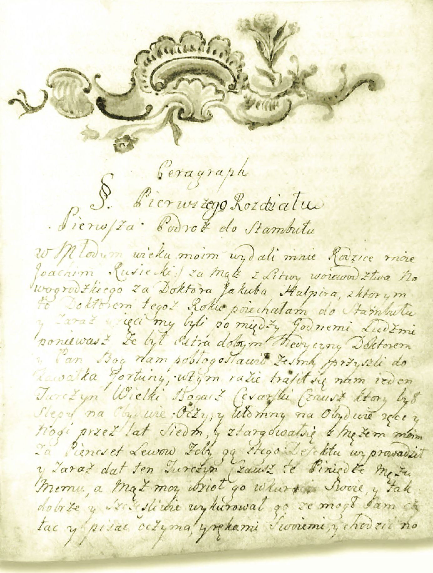 Першая старонка запісак Саламеі Русецкай